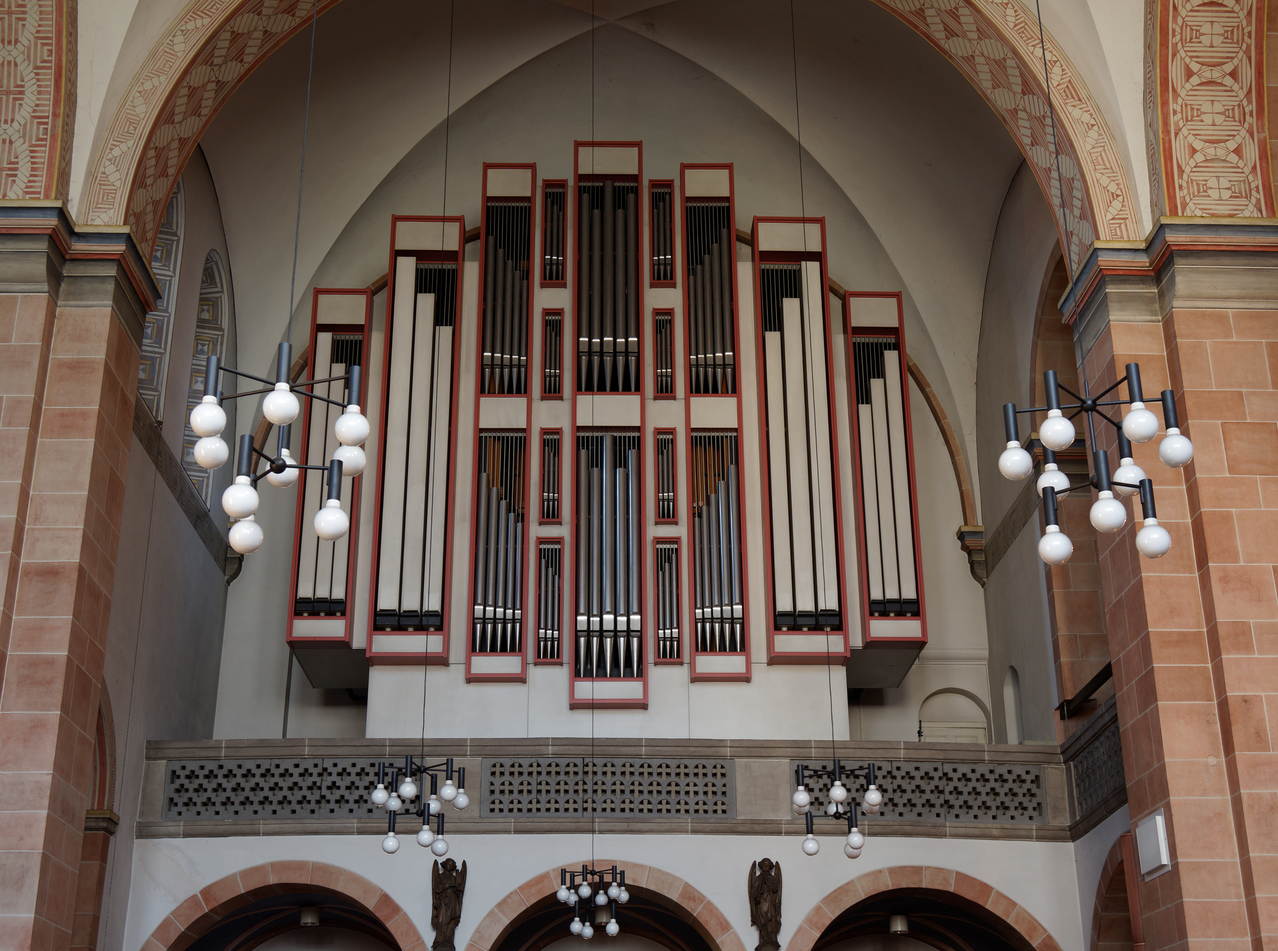 Katholische Kirche Sankt Elisabeth in Bochum-Gerthe, Orgelprospekt This is a photograph of an architectural monument.